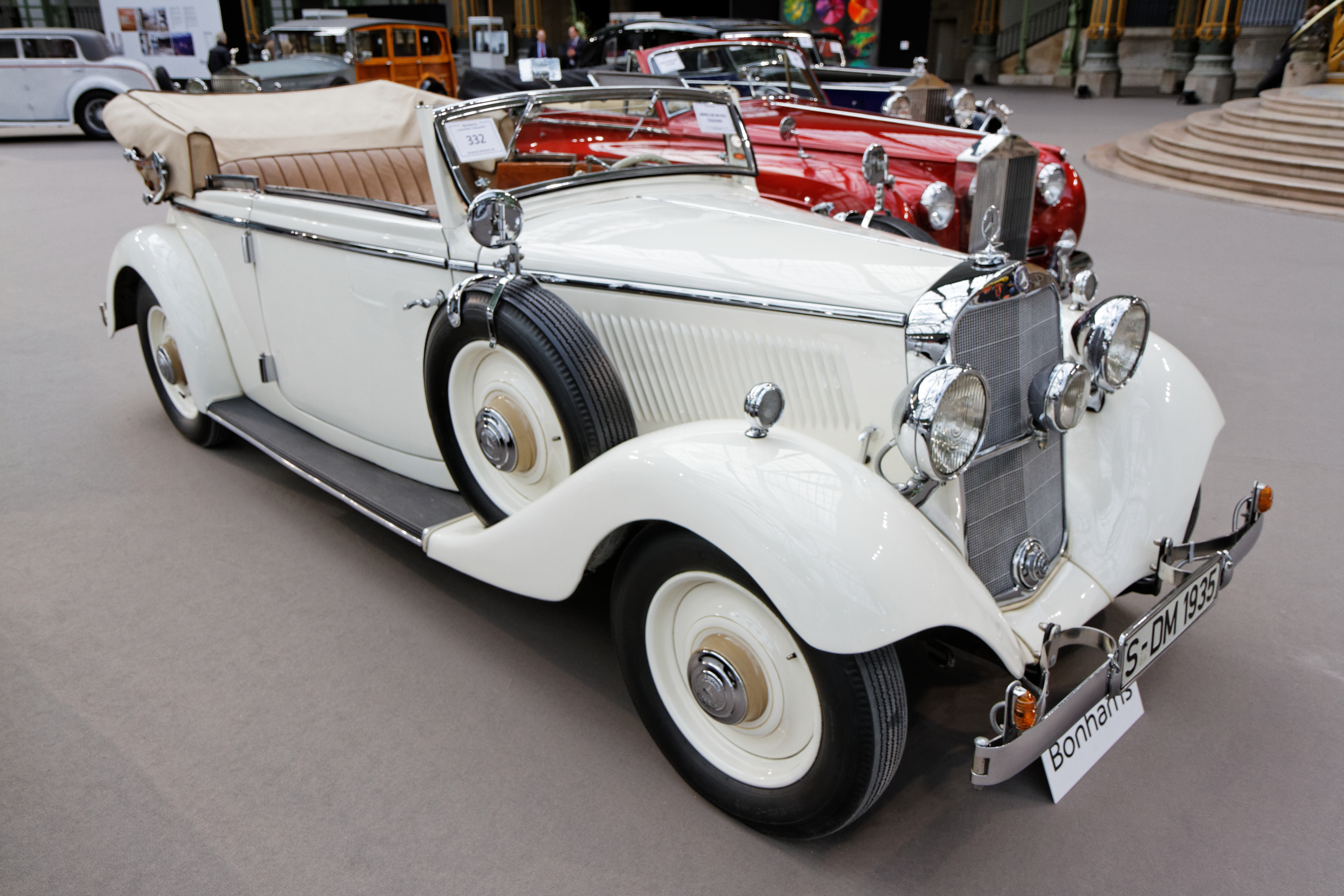 Une Mercedes-Benz 200 cabriolet B au Grand Palais lors de la vente Bonhams en février 2014.